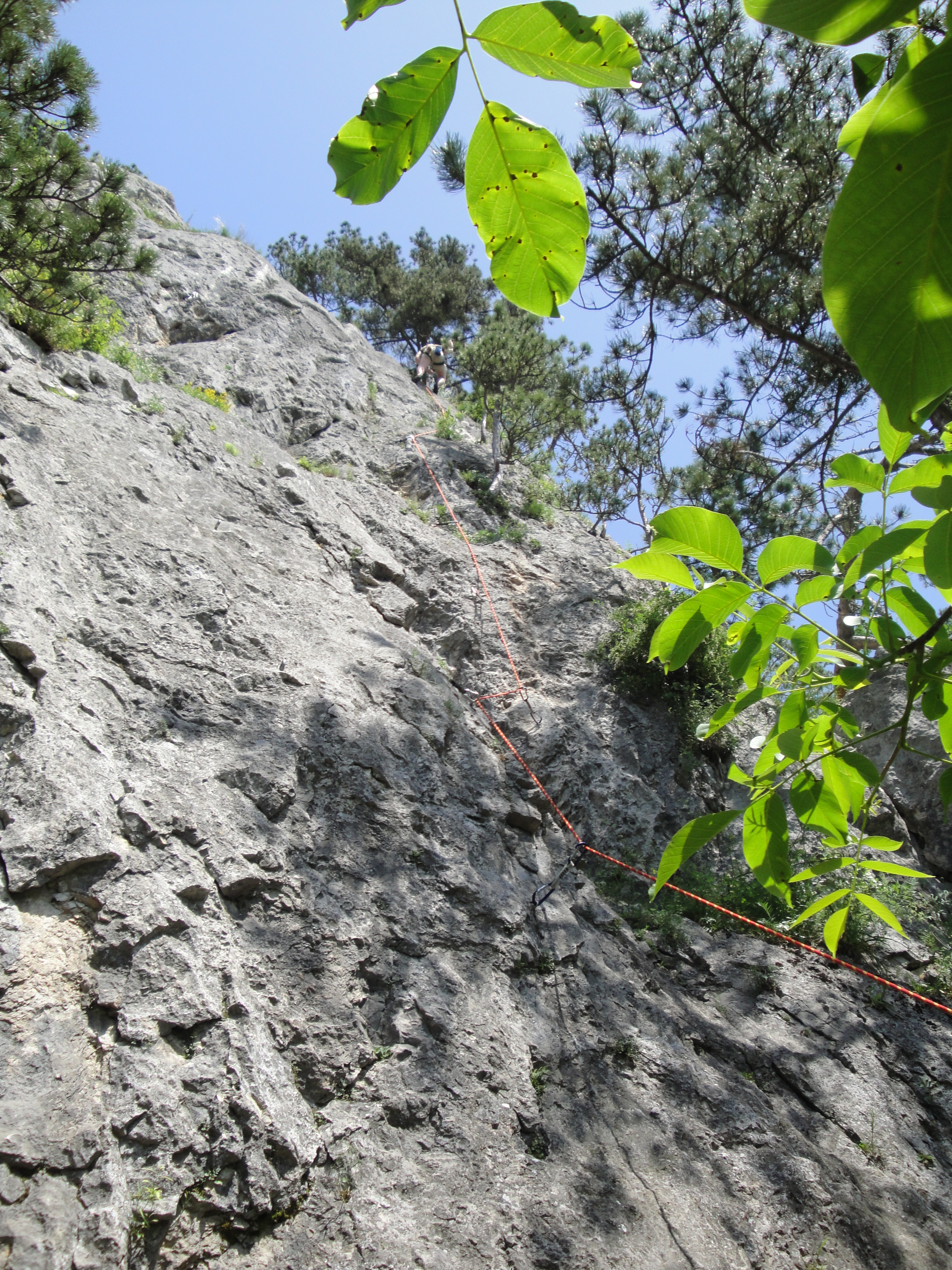 Felsklettern an der Flatzer Wand This file shows the Nature Park with the ID 3097 in Austria.